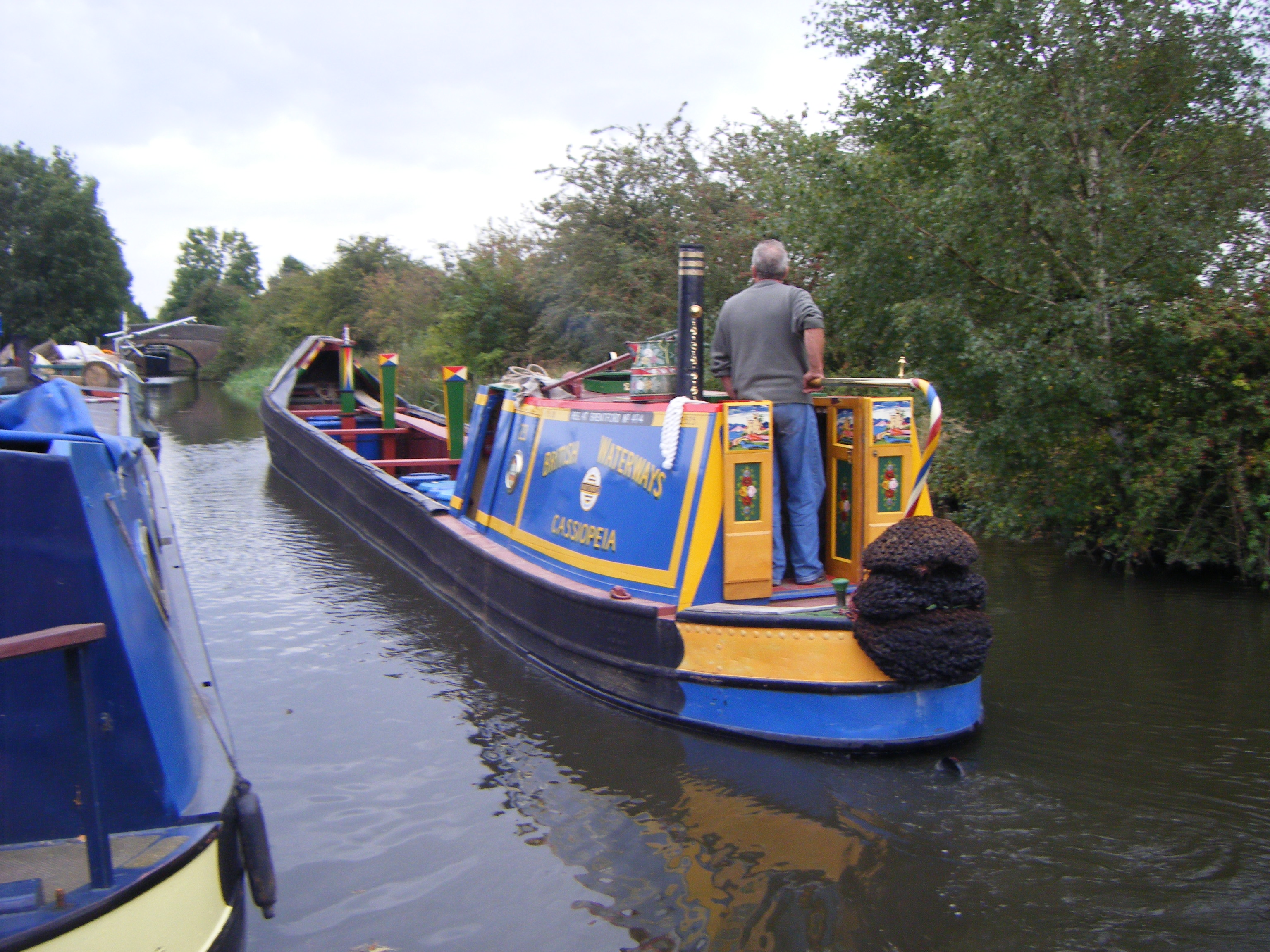 restauriertes Narrowboat, ehemaliges British Waterways Transport Narrowboat